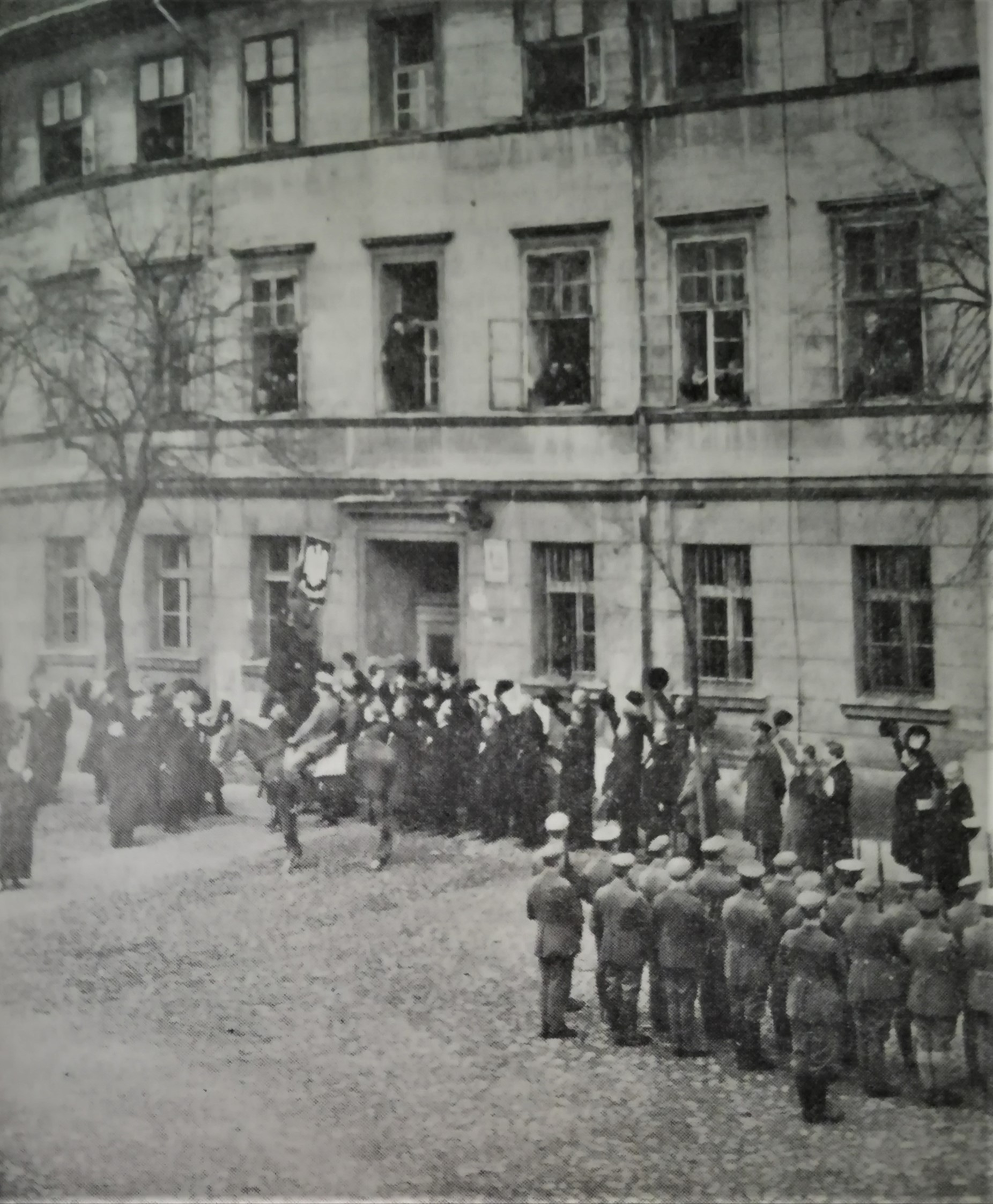 Powstańcy wielkopolscy na starej fotografii.